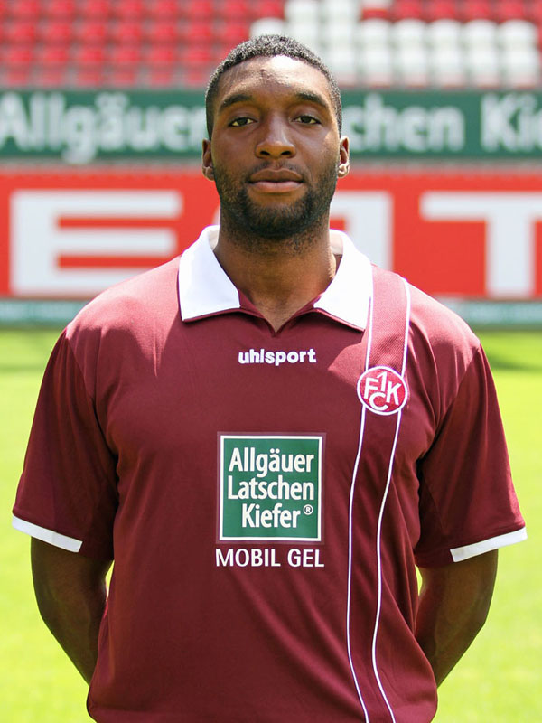 Richard Sukuta-Pasu, Fußballspieler